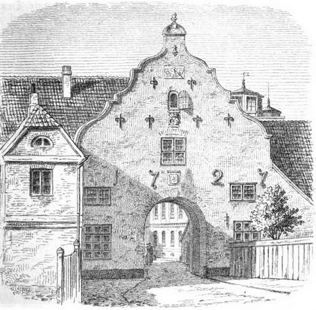 Rødeport i 1800-tallet